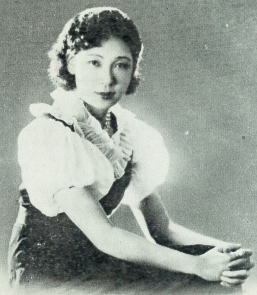 Yōko Sayuri (Japanese, *1901, †1986)